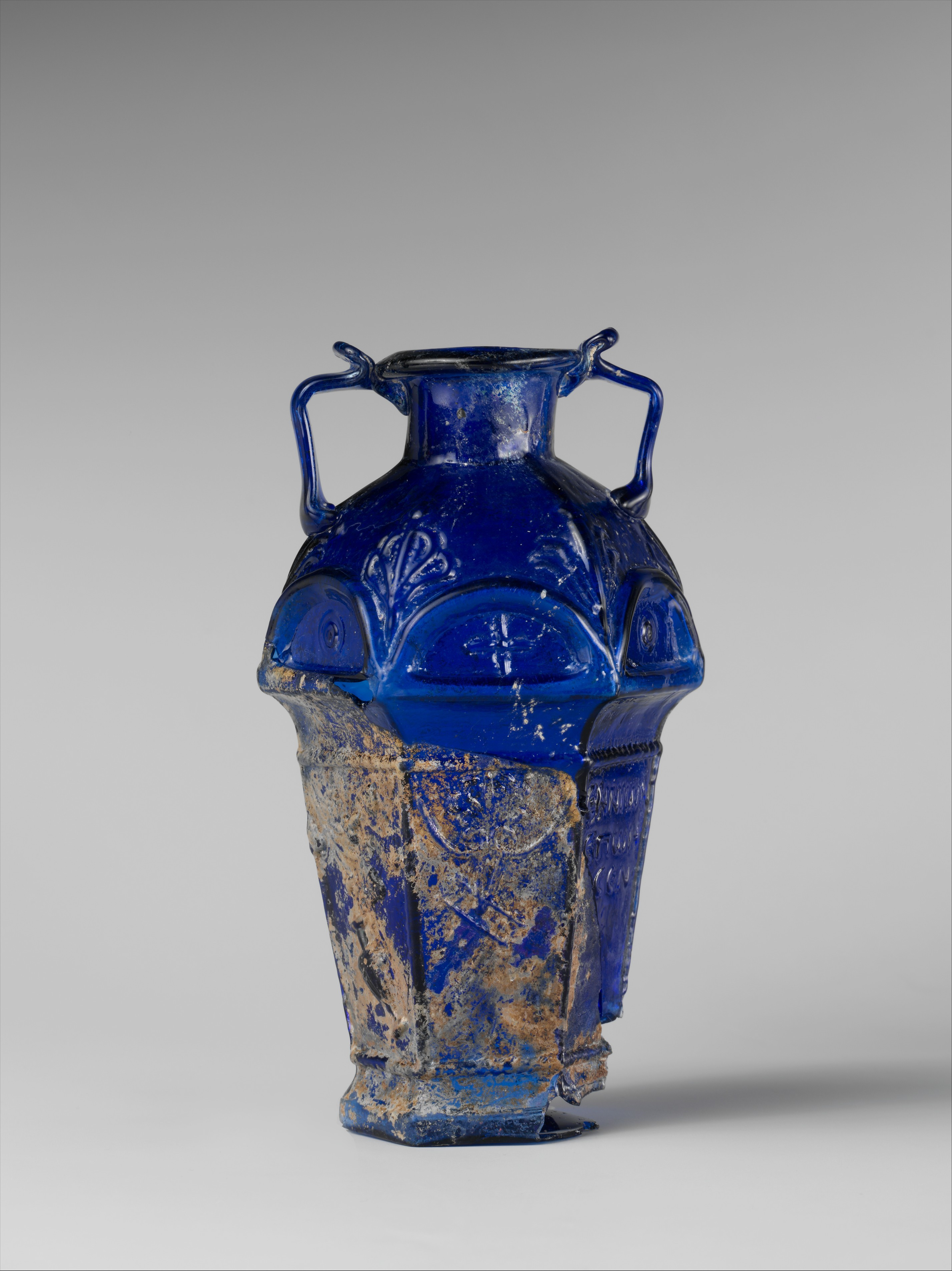 Roman; Amphoriskos, Ennion; Glass